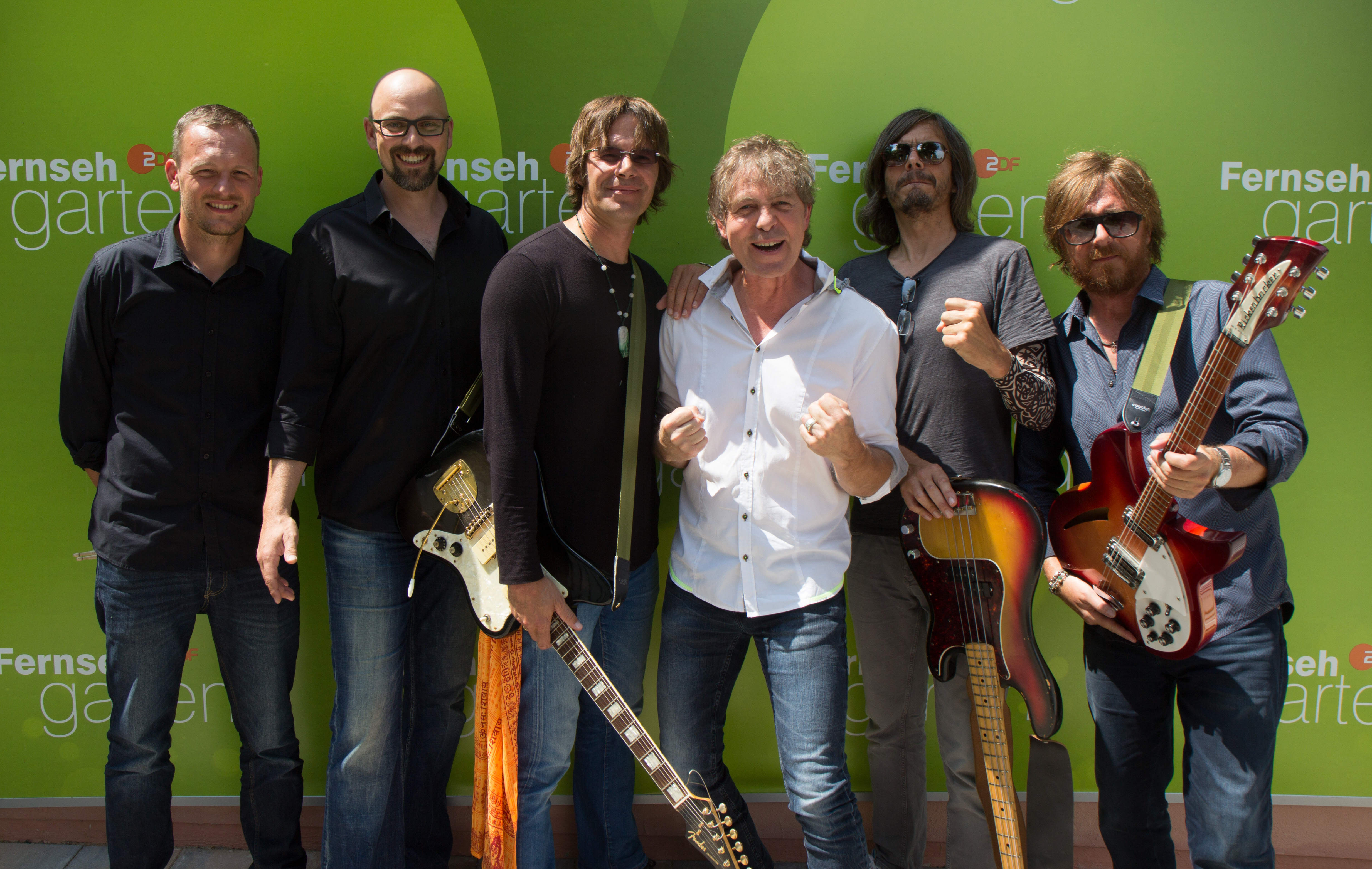 Fools Garden als Gast im ZDF-Fernsehgarten am 15. Juli 2018 in Mainz.